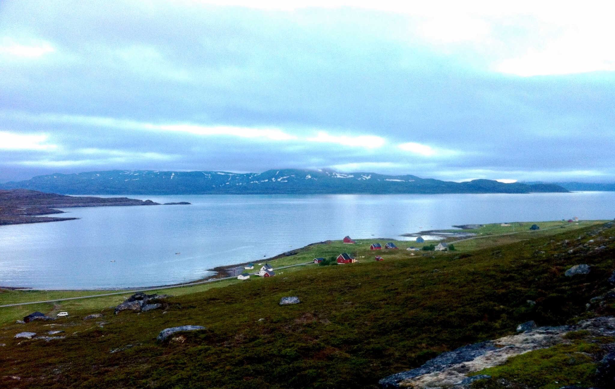 Slåtten i Måsøy, Finnmark